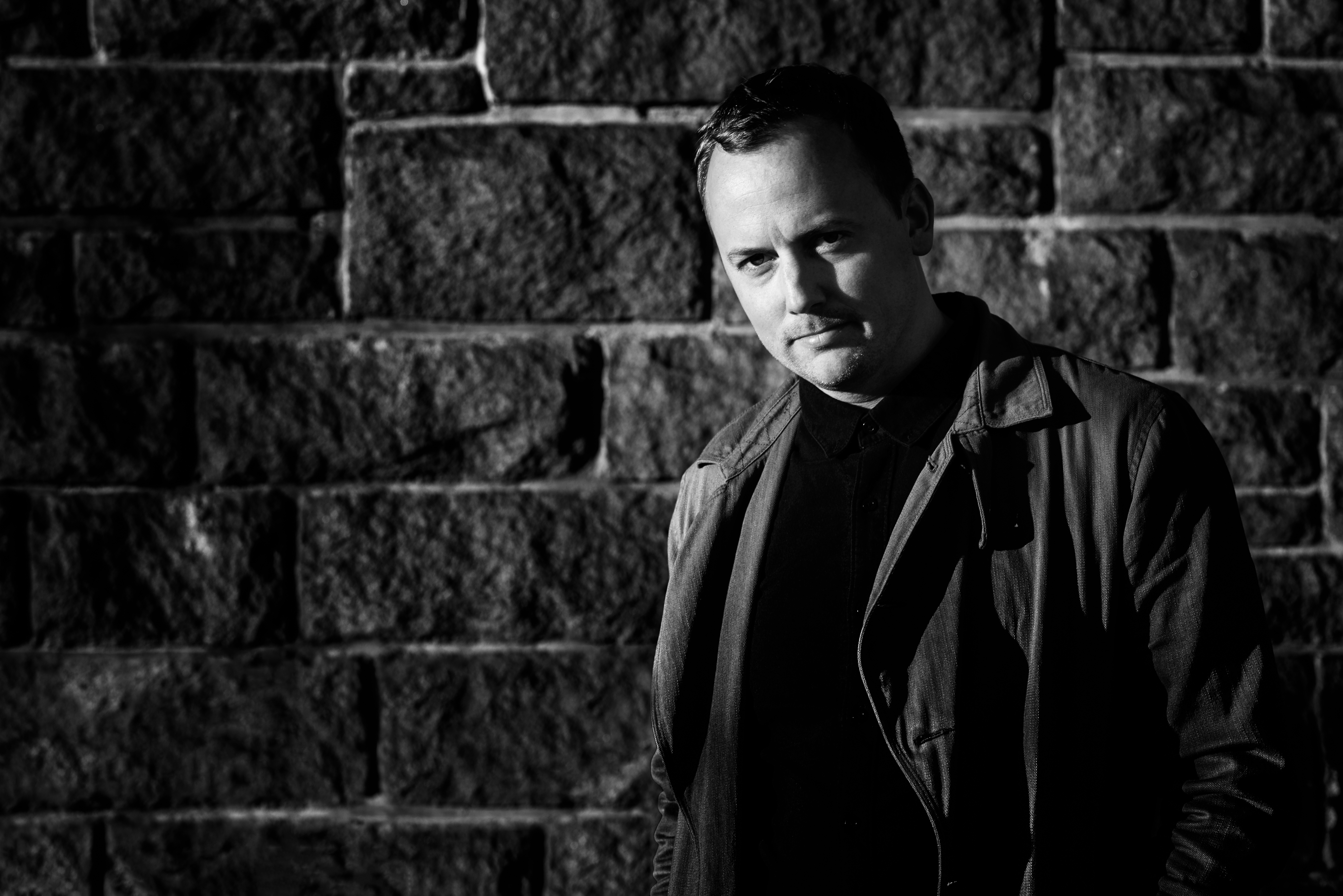 Foto: Brian Rånes